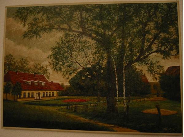 Gut Rattelvitz, das Bauernhaus (gemalt 1943 von einem Kriegsgefangenen aus Dankbarkeit)